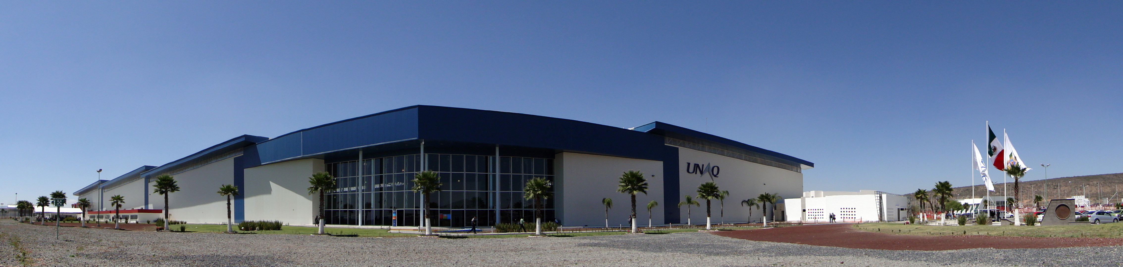 La UNAQ se encuentra ubicada a 45 km de la capital del Estado de Querétaro.